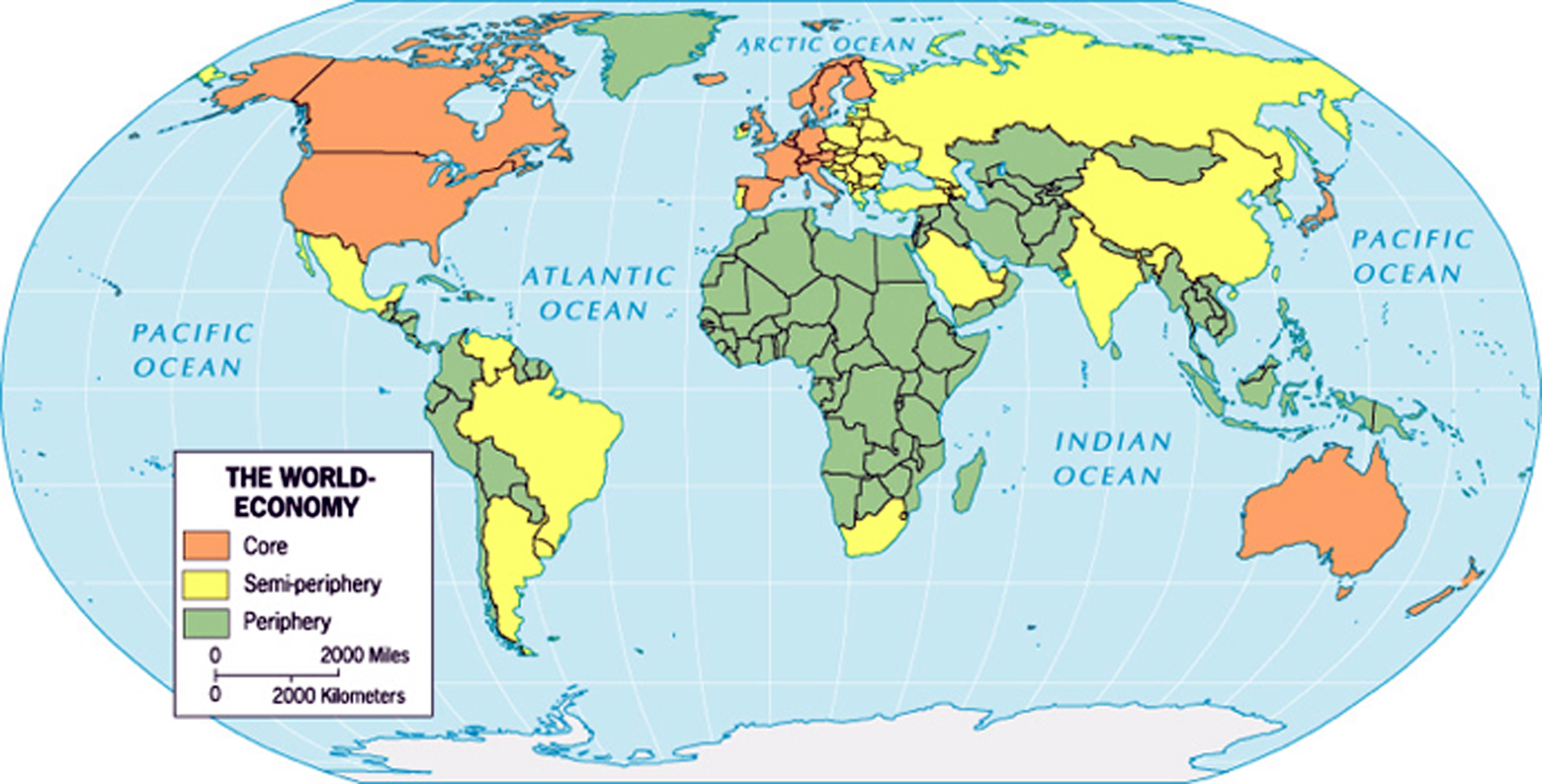 Страны мира в соответствии мир-системным анализом И. Валлерстайна: центр (core), полупериферия (semi-periphery) и периферия (periphery)